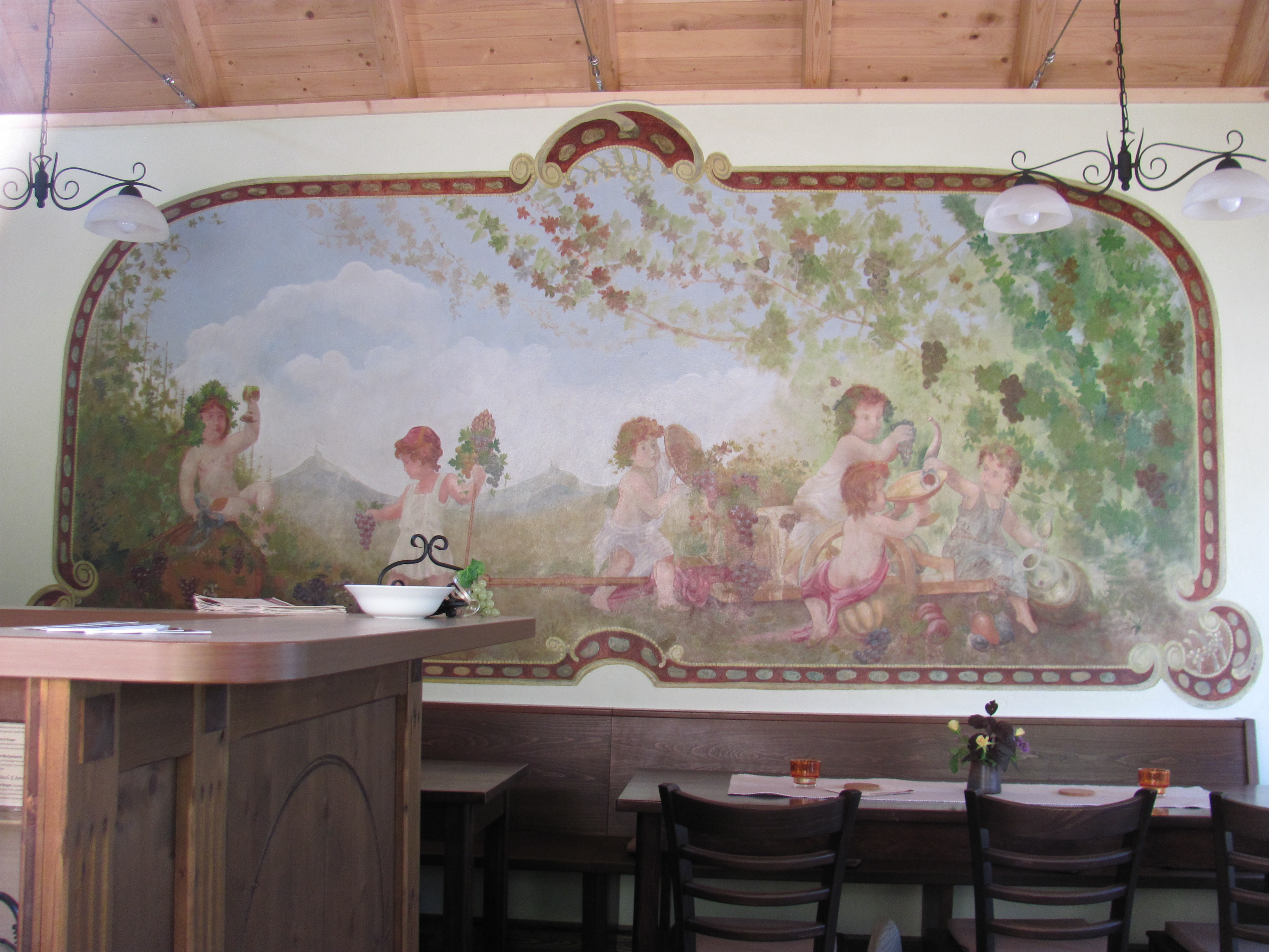 Radebeul-Naundorf Trinkbude